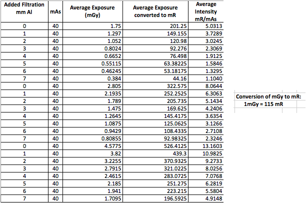 a